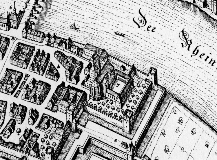 Ausschnitt aus dem Vogelschauplan der Stadt Basel von Matthäus Merian aus dem Jahr 1642 im Werk Topographia Helvetiae, Rhaetiae et Valesiae. Zu sehen ist im Zentrum das Areal des Klosters Klingental.